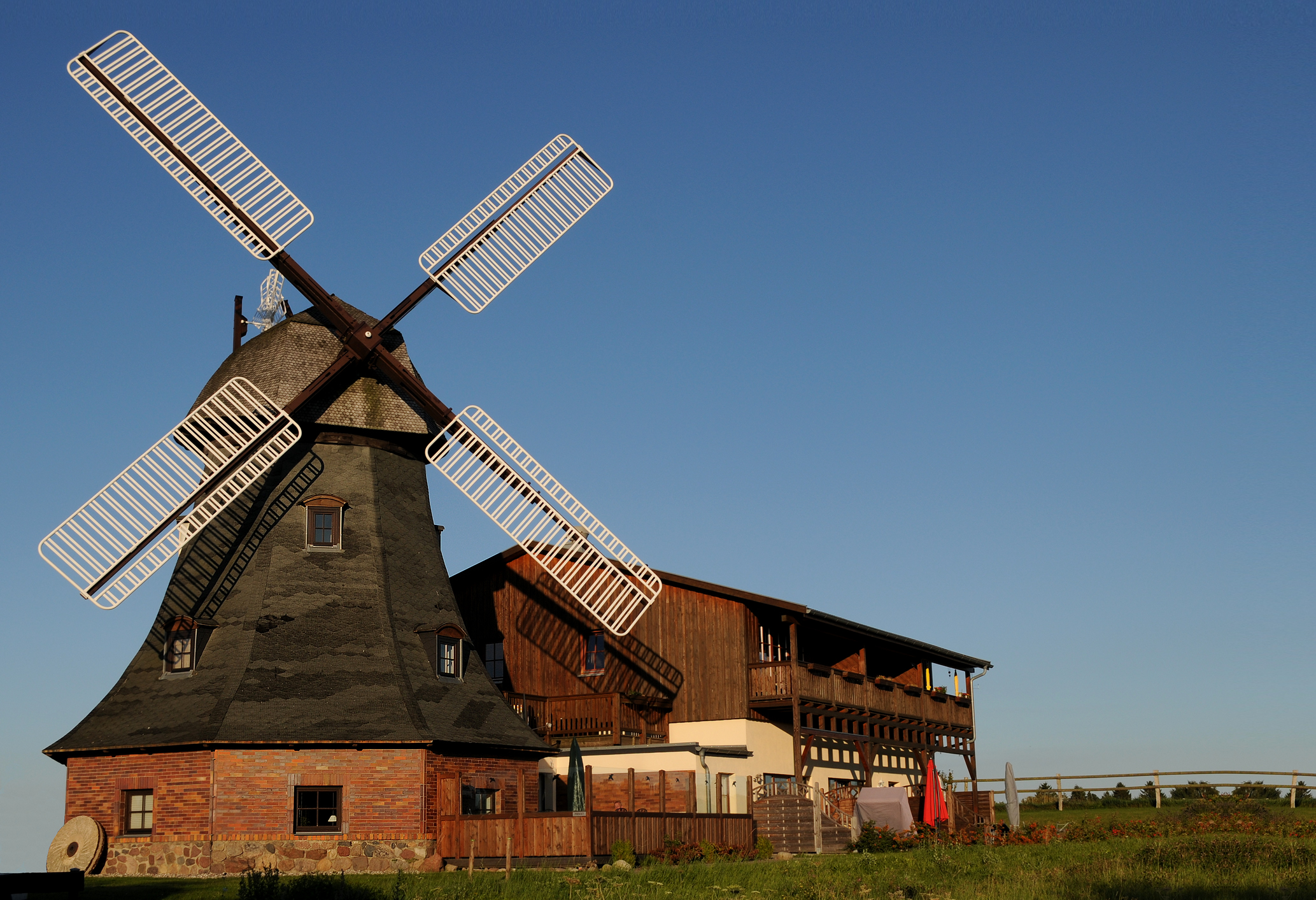 Die Brunshöver Möhl (An der Mühle 3, 18225 Kühlungsborn) wurde in den 1870er Jahren erbaut und ist heute das Wahrzeichen der Region.